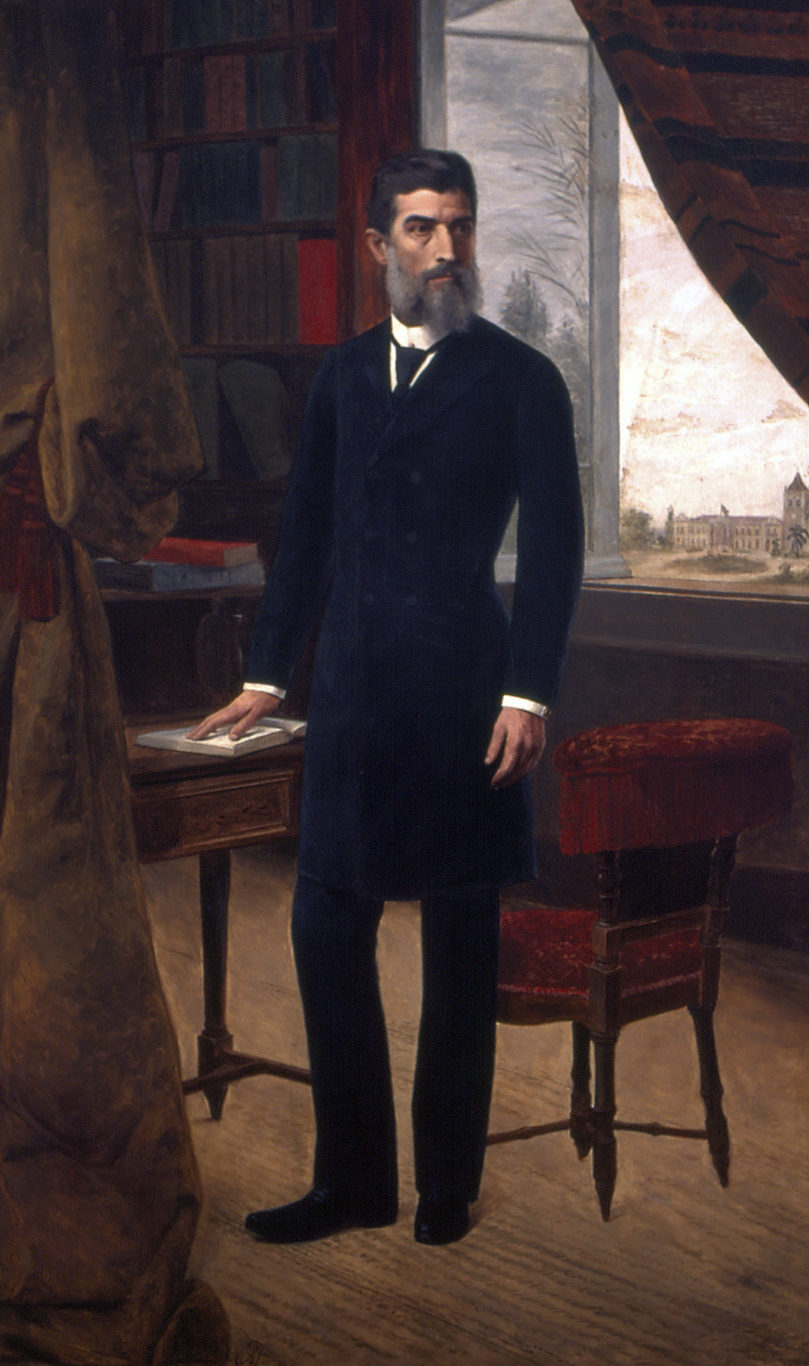 Obra que integra o acervo do Museu Paulista da USP.